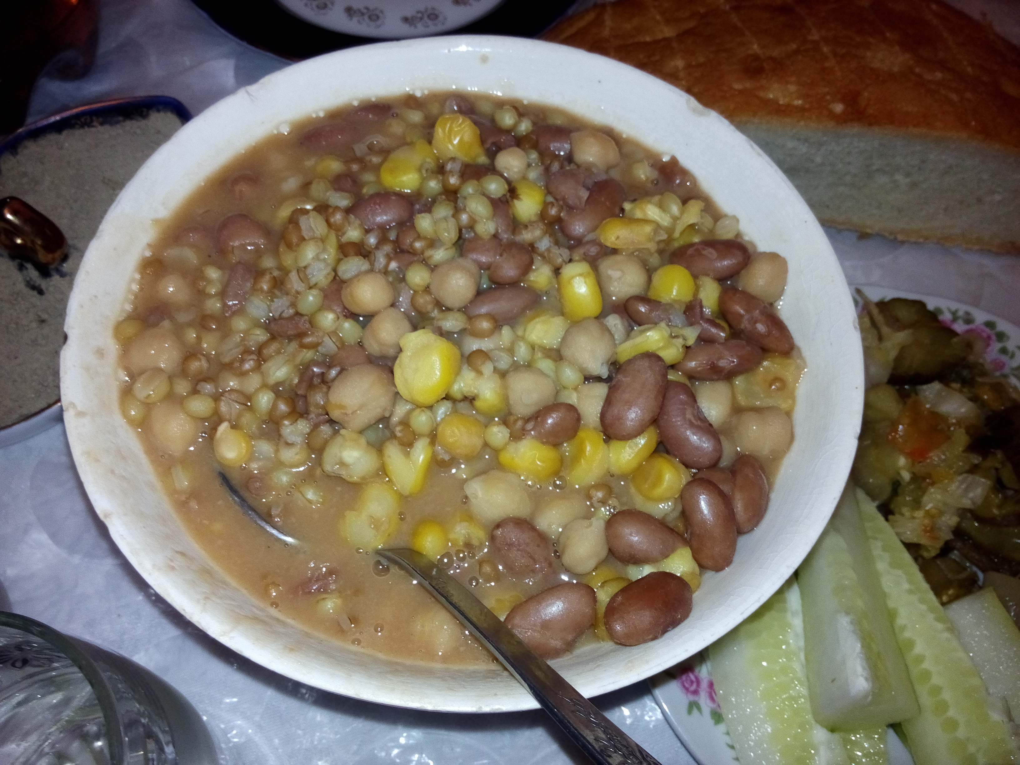 Hədik